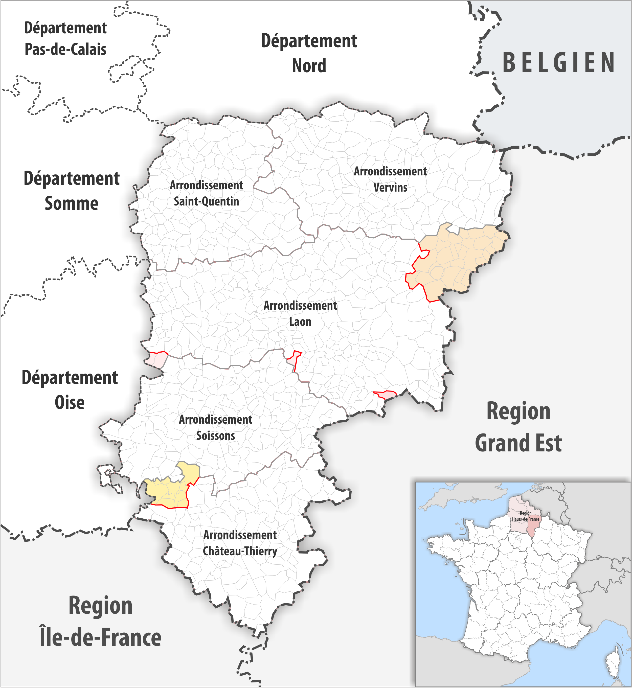 Arrondissements Anpassungen auf 2017 im Departement Aisne